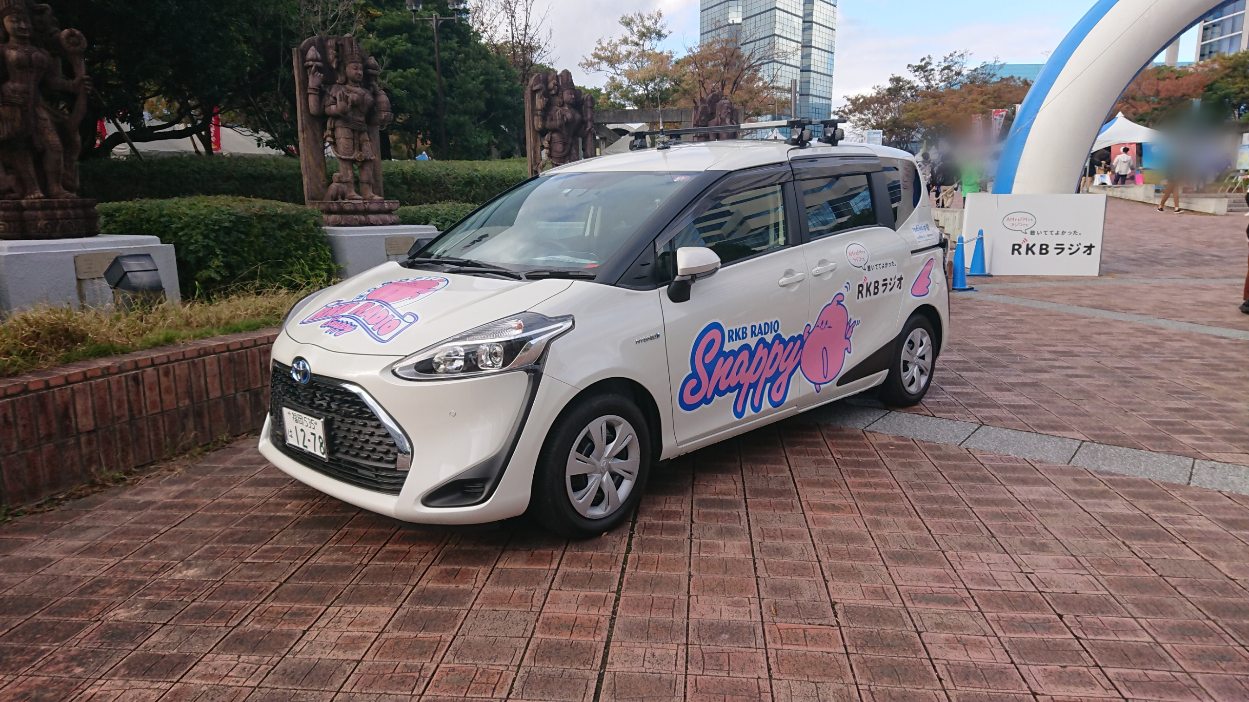 RKBラジオまつり2019にて撮影。ベース車はトヨタ・シエンタ。